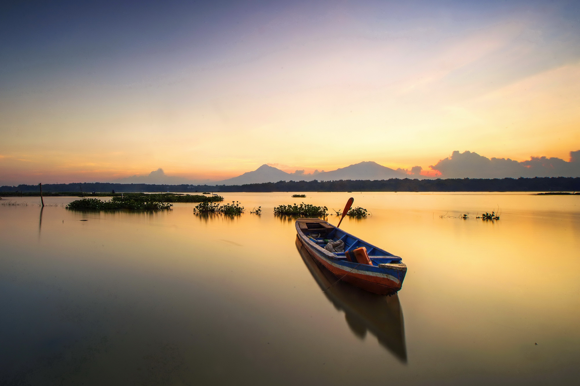 Waduk Cengklik terletak di Desa Ngargorejo, Kecamatan Ngemplak, Kabupaten Boyolali. Sejarah pembangunan waduk Cengklik pada tahun 1926 - 1928 oleh Pemerintah Belanda. Nama Cengklik diambil dari dukuh pertama yang dimulai menjadi waduk yaitu Dukuh Cengklik. Waduk ini terletak di Desa Ngargorejo dan Sobokerto, Kecamatan Ngemplak ± 20 km, ke arah timur laut Kota Boyolali, Bila dari Bandara Adi Sumarmo ± 1,5 km (di sebelah barat bandara ). Waduk dengan luas genangan 300 ha ini dibangun pada zaman Belanda, tujuannya untuk mengairi lahan sawah seluas 1.578 ha. Letak Waduk Cengklik sangat strategis, berdekatan dengan Bandara Adi Sumarmo, Asrama Haji Donohudan, Monumen POPDA, dan Lapangan Golf. Sehingga selain dimanfaatkan sebagai sarana irigasi, Waduk Cengklik juga dimanfaatkan untuk perikanan dan destinasi wisata air di kabupaten Boyolali.